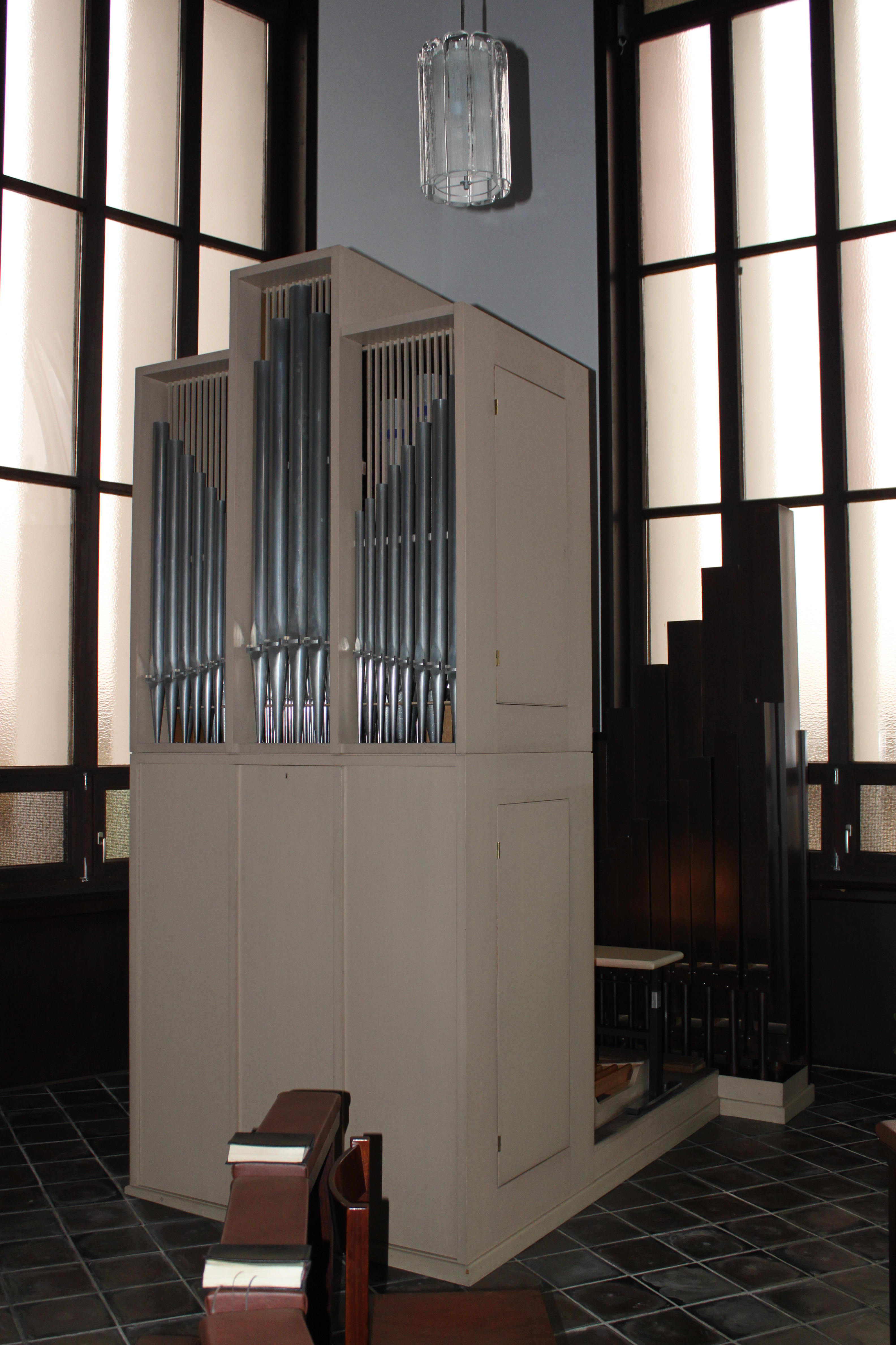 Orgel der Klosterkirche Marienfeld bei Maria Roggendorf, errichtet 1981 von Orgelbau Walcker-Mayer